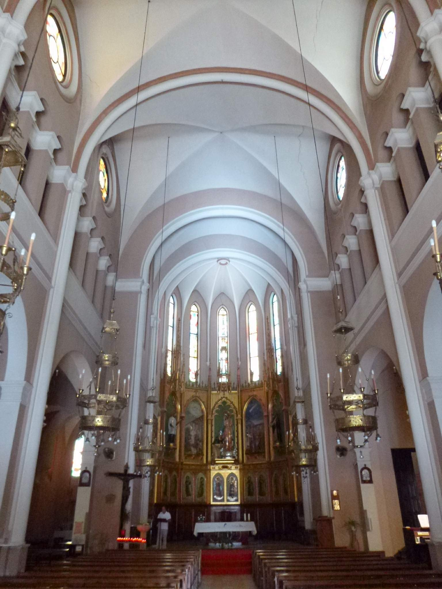 Iglesia del Roser (Tortosa, Tarragona)